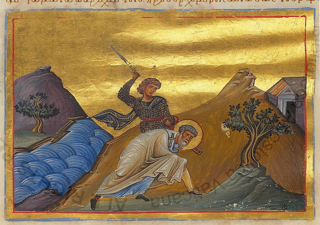 Феодор Александрийский Миниатюра Минология Василия II. Константинополь. 985 г. Ватиканская библиотека. Рим